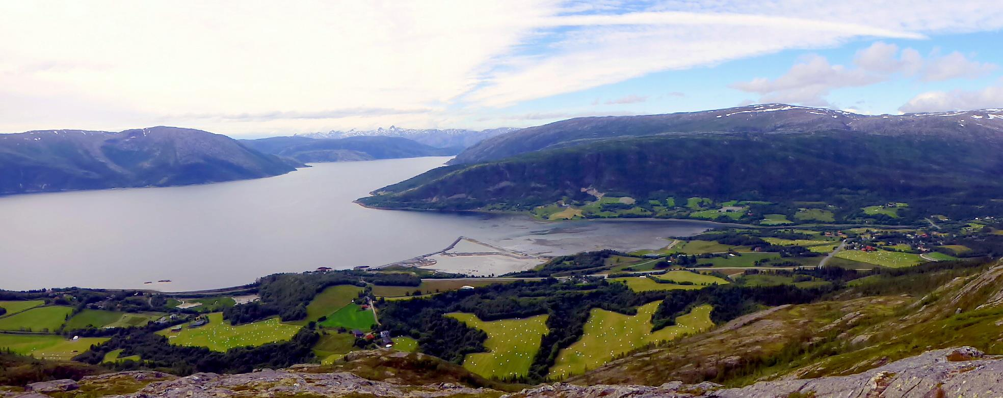 Panoramabilde av Holandsvika. I venstre bildekant skimtes nabobygda Lindset. I høyre bildekant kan vi se utløpet til Drevjeelva (Drevjo). Midt på bildet ser vi det påbegynte arbeidet med å fylle igjen våtmarksområdet; Drevjeleira. I horisonten bak Vefsnfjorden kan vi skimte De sy søstre.